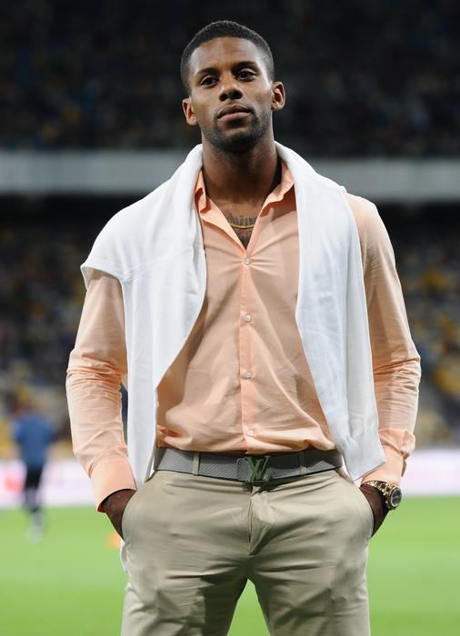 Джермейн Ленс — нідерландський футболіст